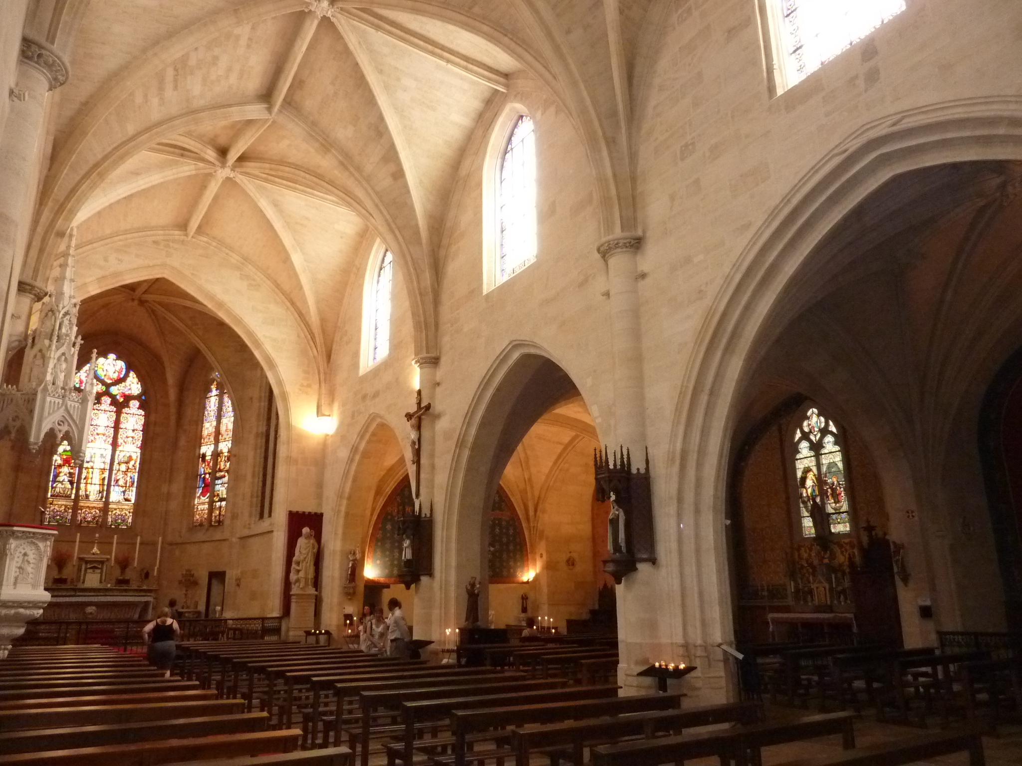 Église Saint-Éloi de Bordeaux